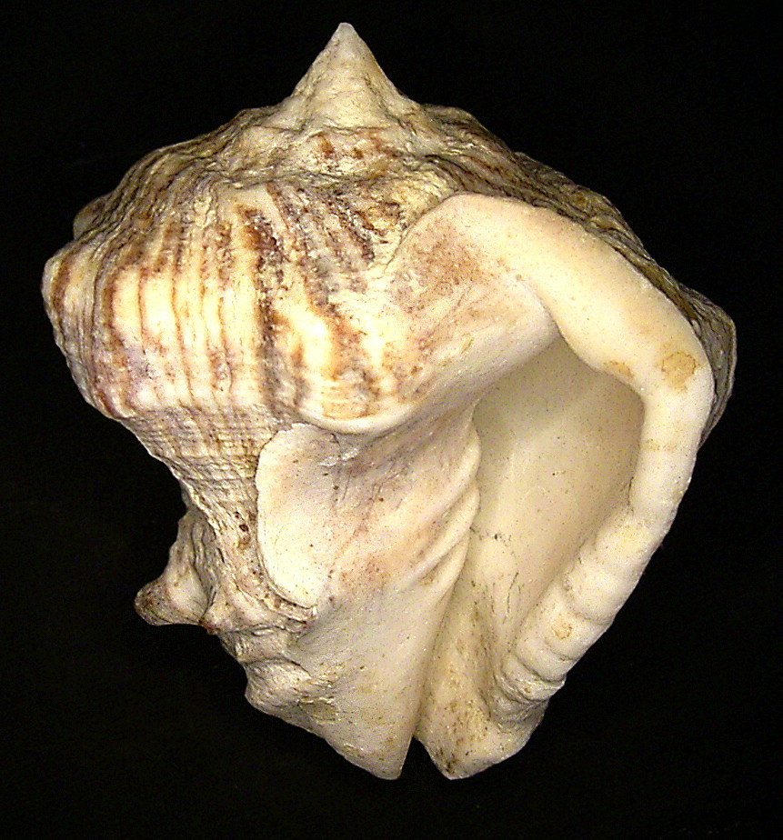 Familie: Vasidae Groesse: 75 mm Fundort: Kenia, Diani-Beach leg.det. U.Schmidt, 1990 Photo: U.Schmidt, 2005